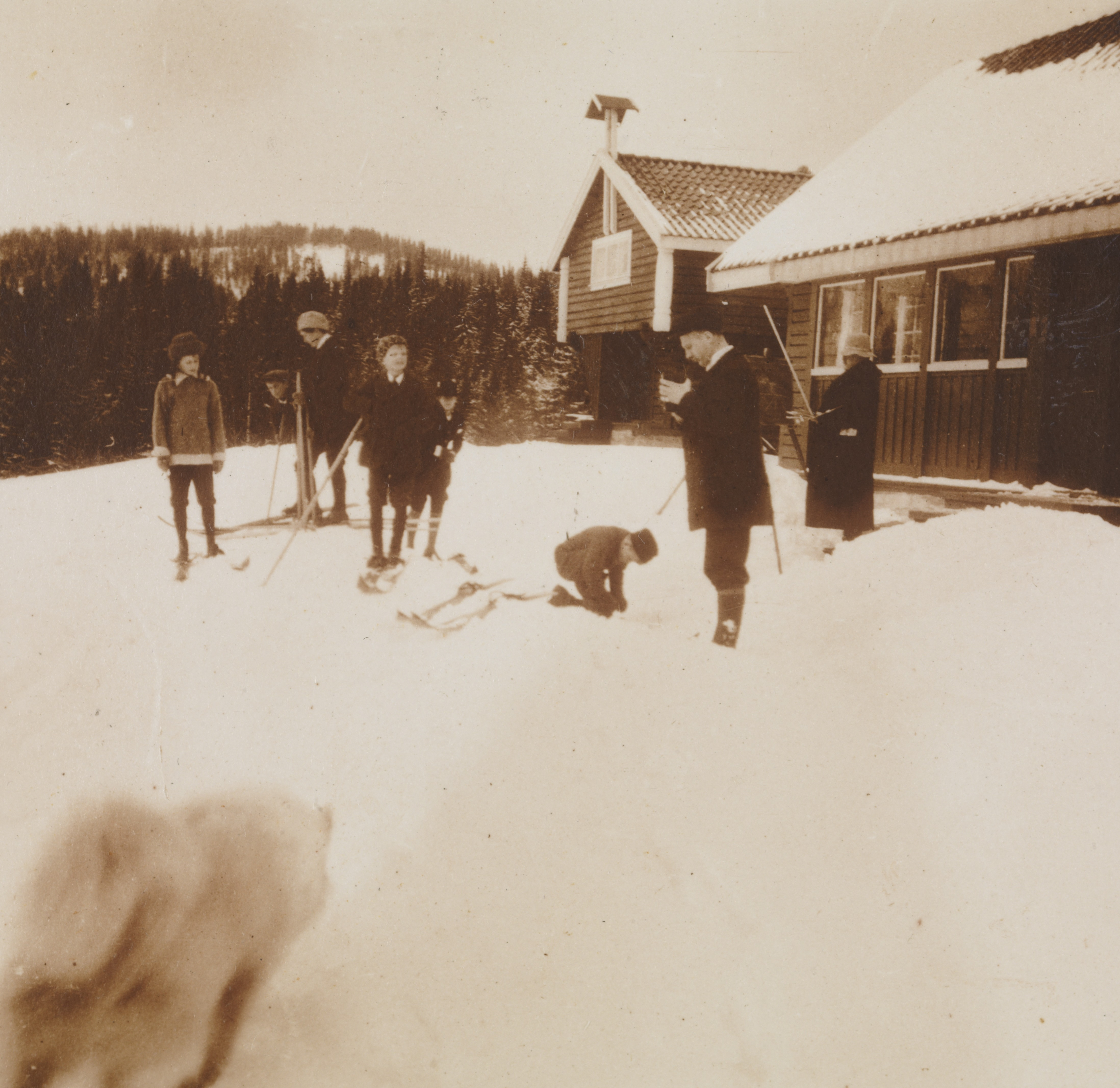 Forberedelser til en skitur med ungdom. Blant dem er antagelig Nansens og skipsreder Klaveness barn. Depicted place: Akershus, Bærum